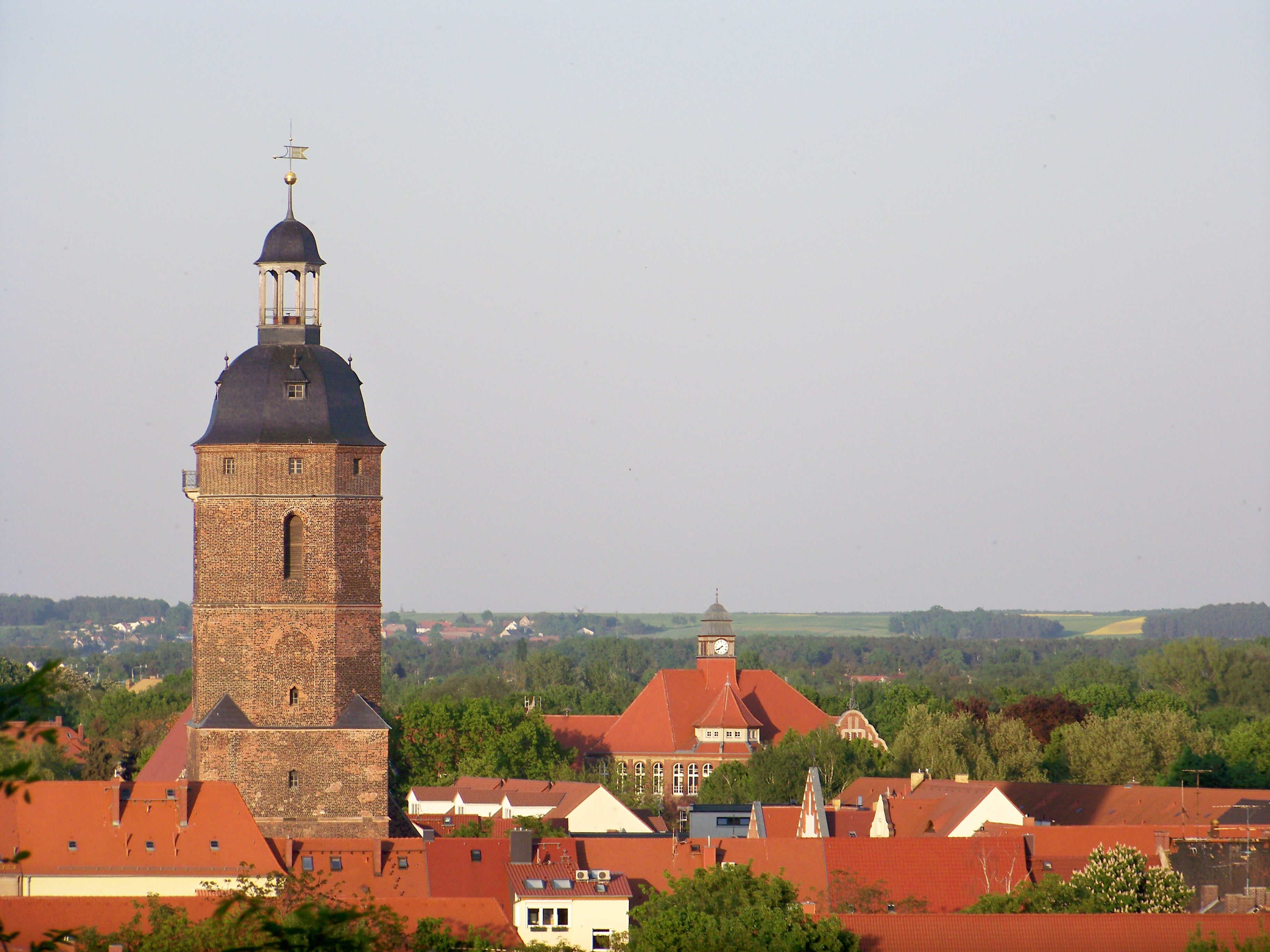 Nikolaikirchturm und Martin-Rinckart-Gymnasium in Eilenburg von der Burg Eilenburg gesehen